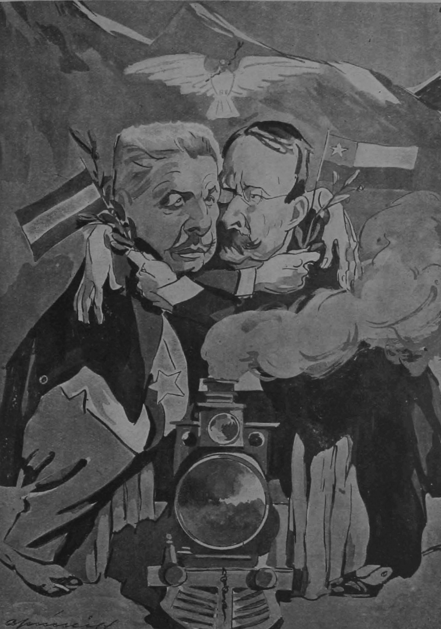 El mejor portico para el túnel trasandino